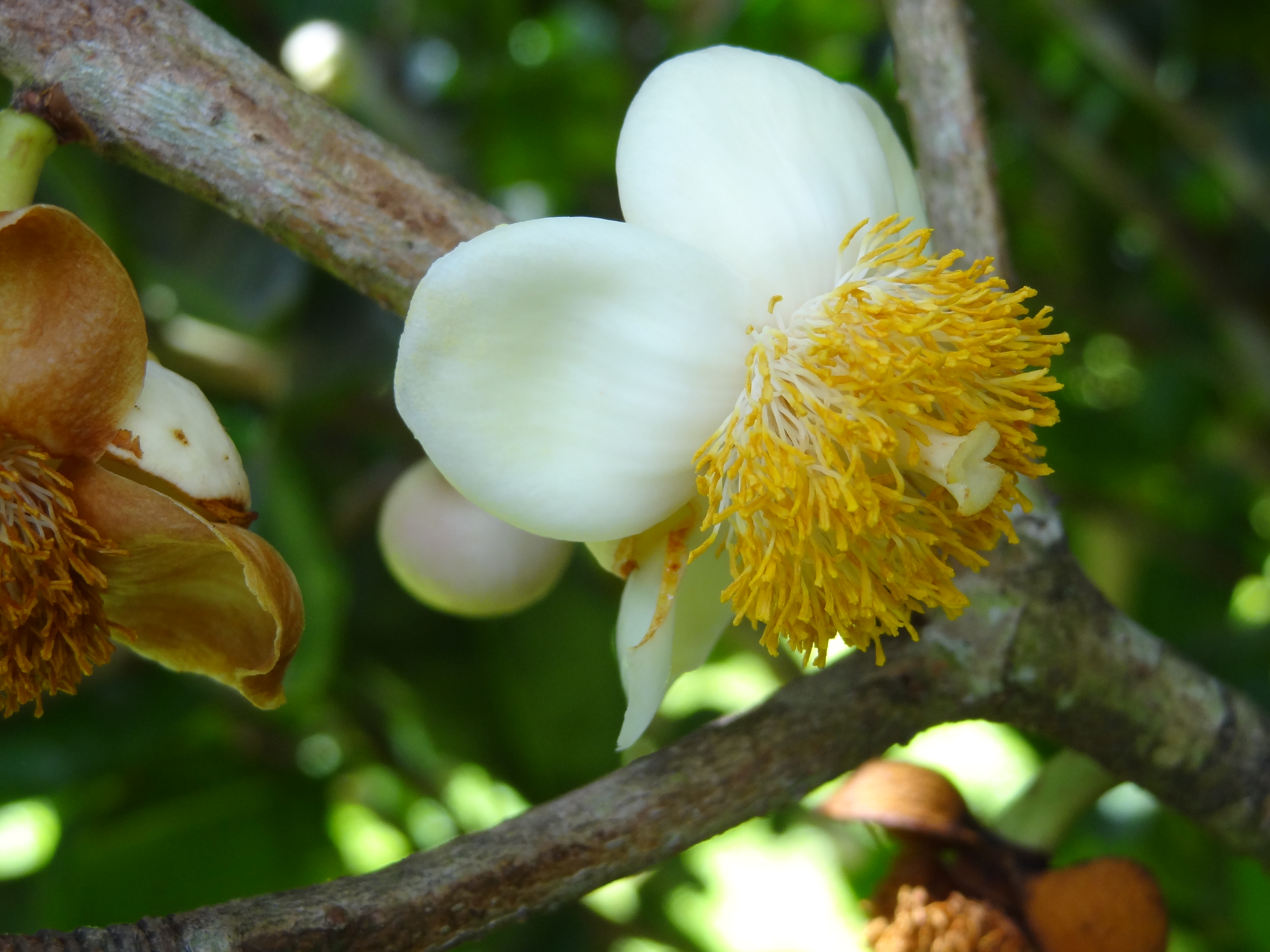 Fleur